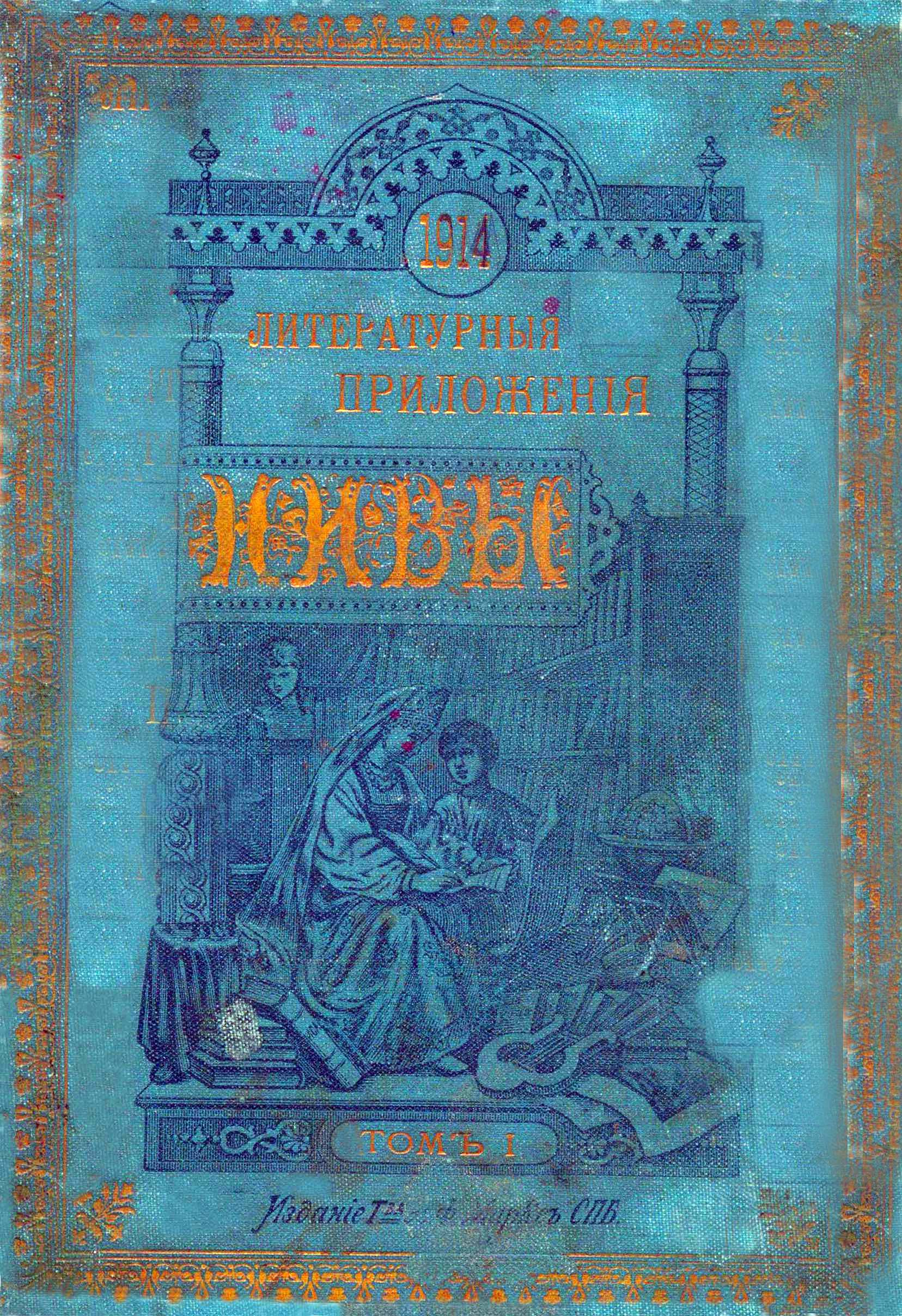 Литературныя приложения Нивы. 1914 год. Том 1 (январь, февраль, март, апрель). «Родная» обложка (надпись Переплётная «Нивы»). Изображена пишущая девушка в кокошнике ("Алёнушка") и её брат ("Иванушка") в библиотеке в окружении полок с книгами и различных произведений искусства.